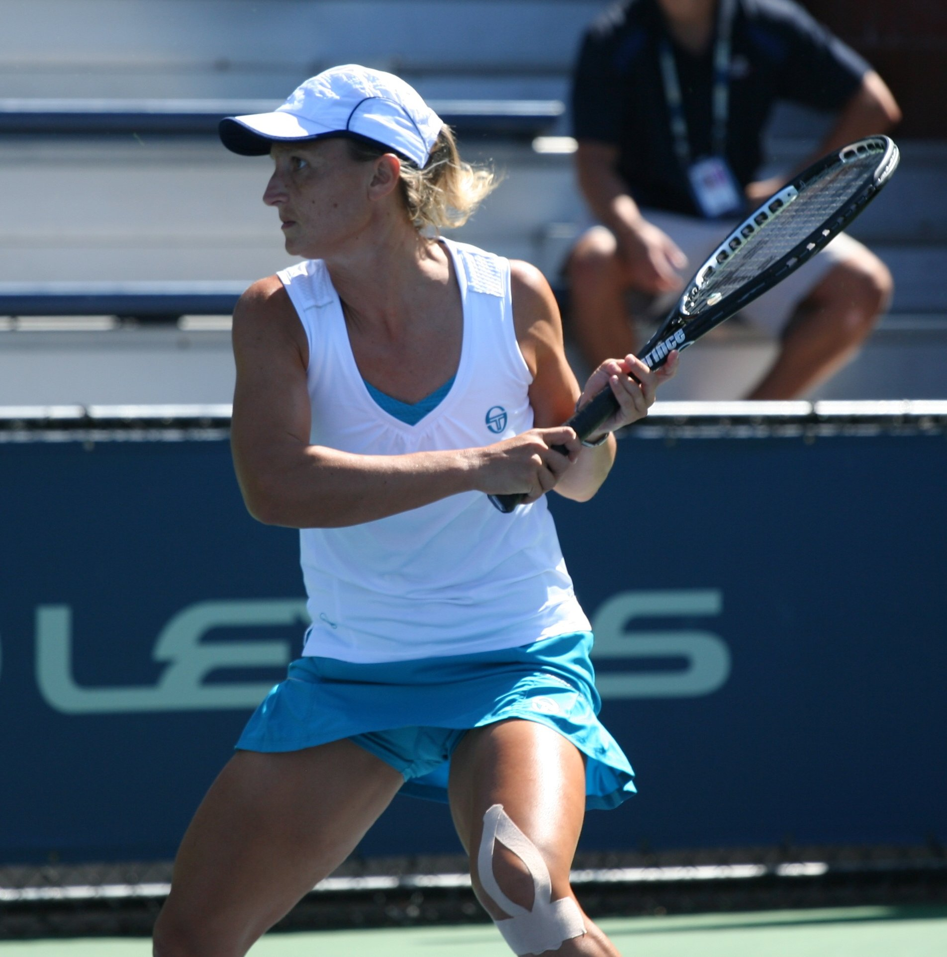 U.S. Open Wednesday, Sept. 2, 2009